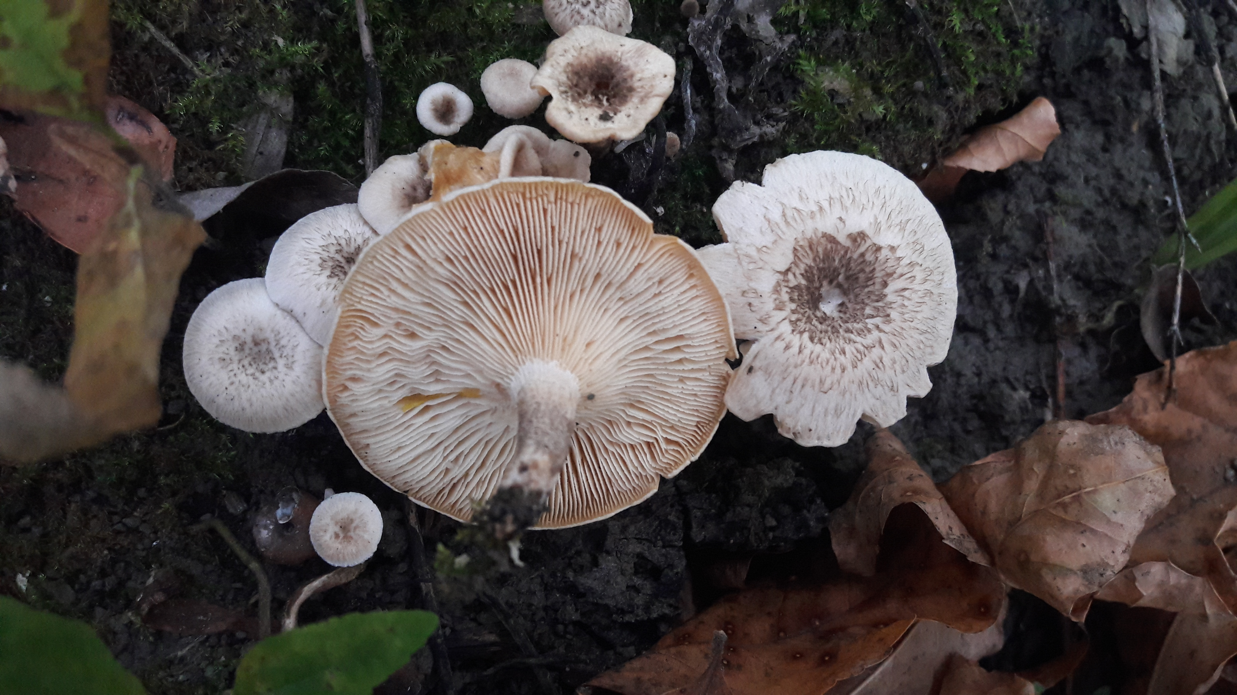 Lentinus tigrinus je vrsta jestive gljive iz porodice Polyporaceae. Zbog pomalo žilavog mesa, u narodu je poznata još i kao vrbina žilavka. Plodonosi u grupama, u blizini reka ili jezera. Može se naći od kasnog proleća do jeseni, na obolelim deblima ili panjevima listopadnog drveća poput vrbe, topole ili bukve.